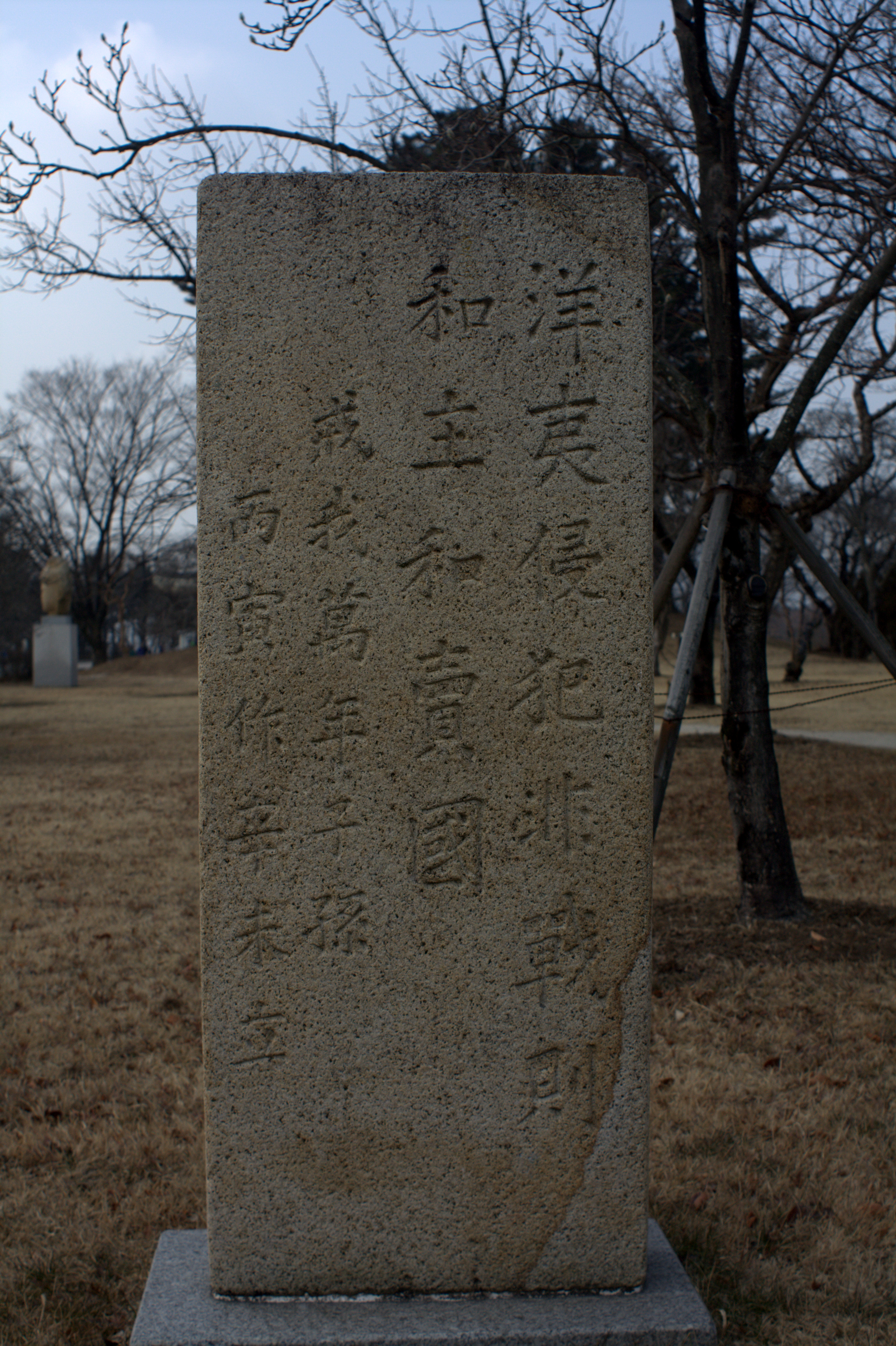 경주박물관 뜰에 있는 척화비